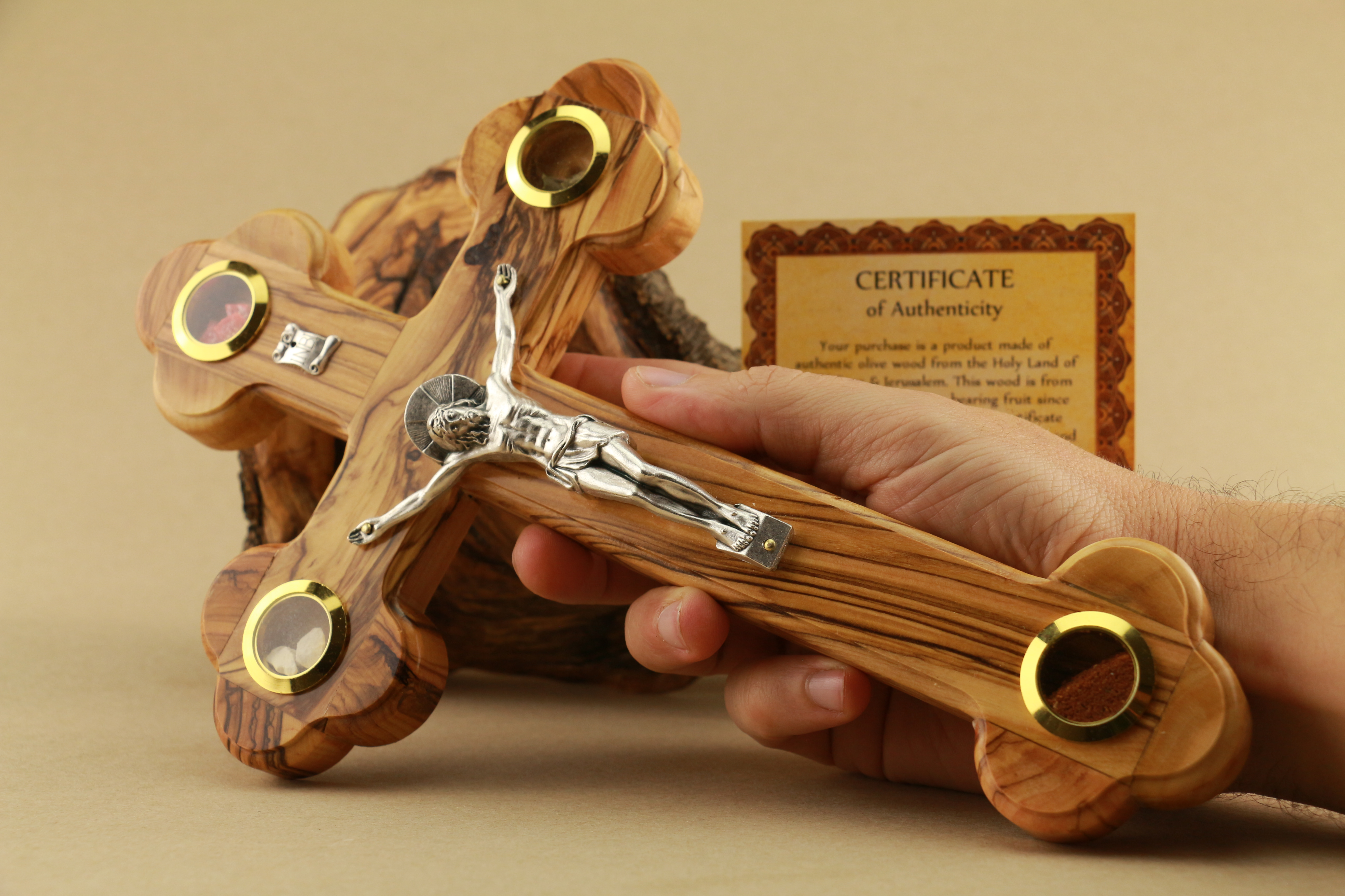 Данный крест сделан в Иерусалиме из оливкового дерева. Данный крест является наиболее популярным и востребованным товаром среди православных паломников приезжающих на Святую землю.